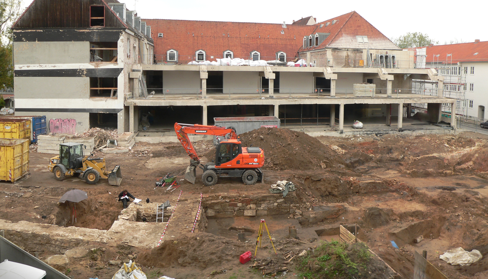 Ausgrabung am Hohen Ufer